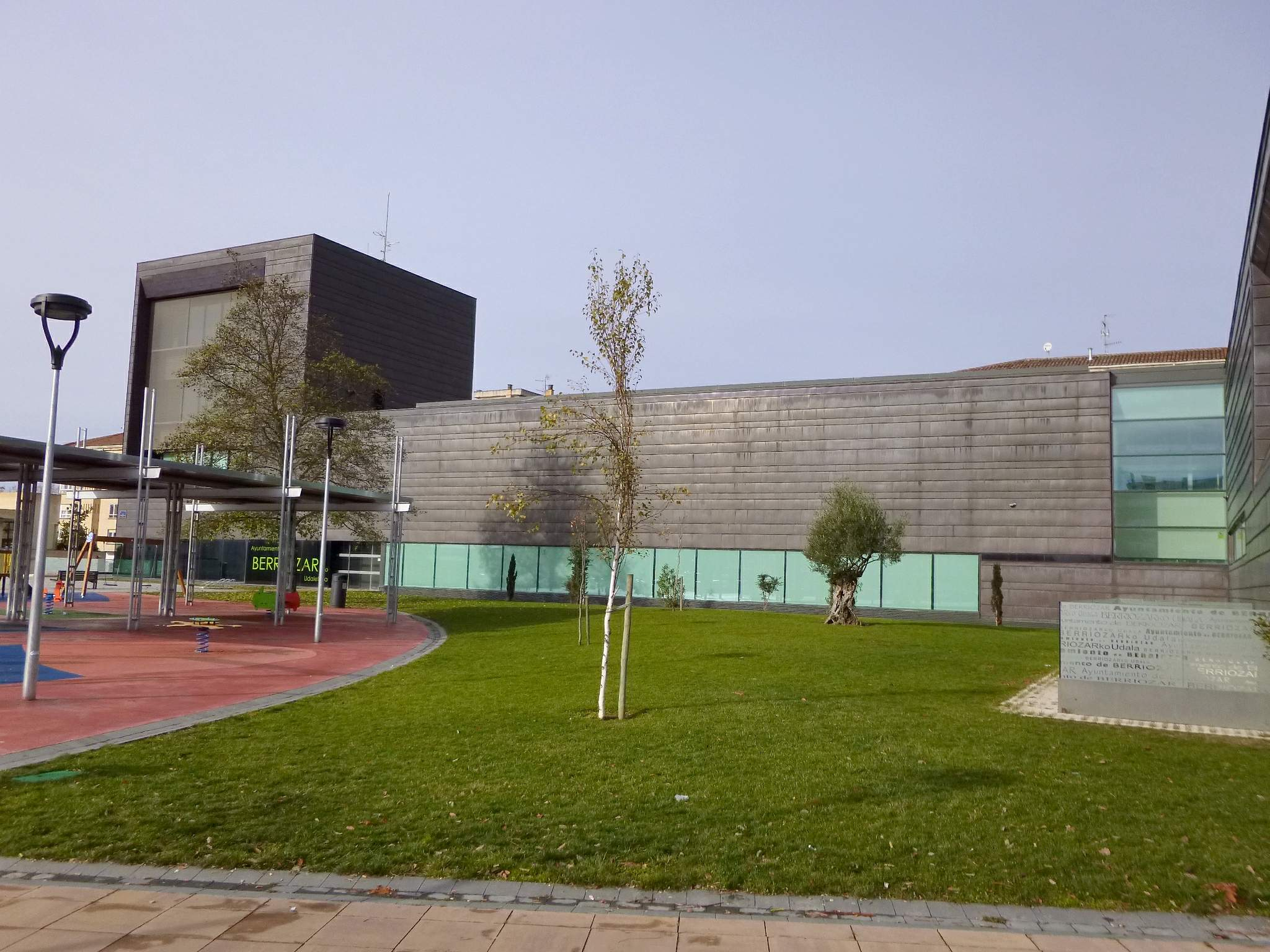 Ayuntamiento de Berriozar (Navarra)